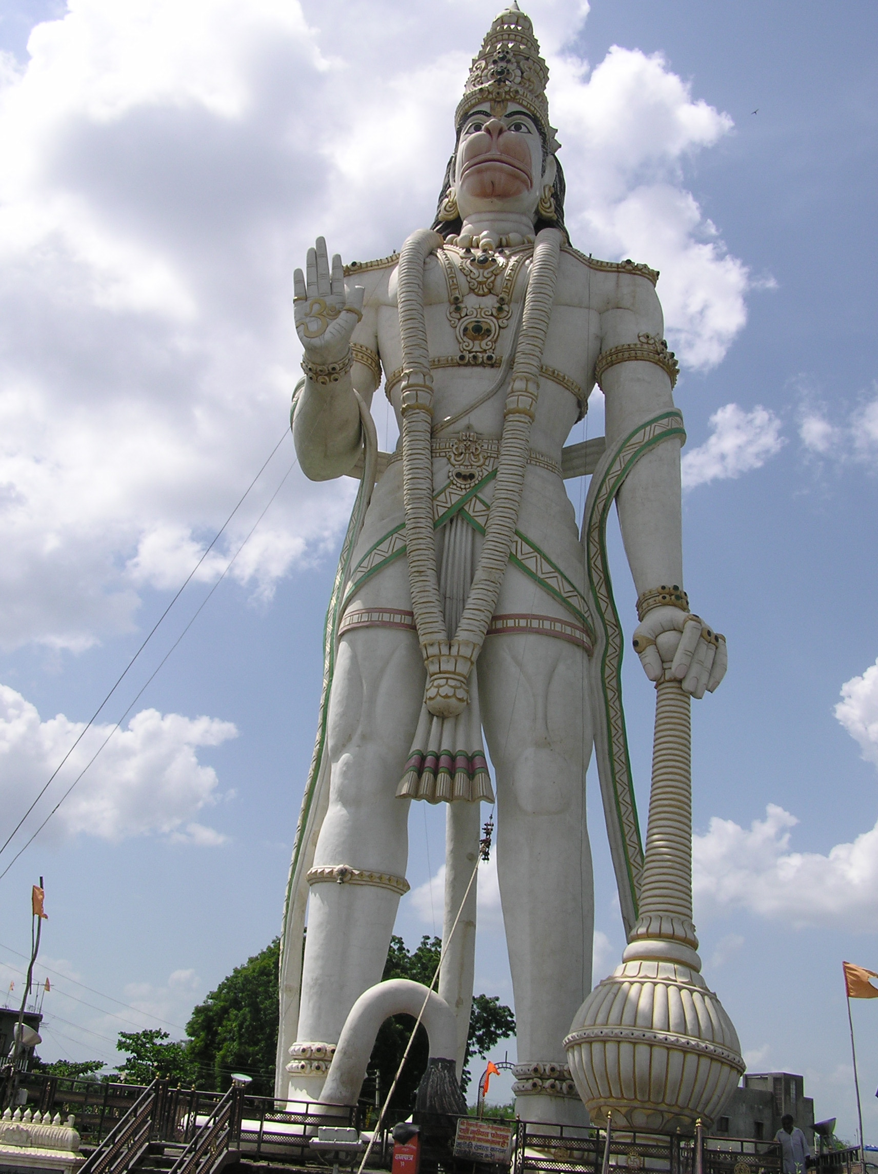 Nandura (Maharashtra), India, 105 ft tall.